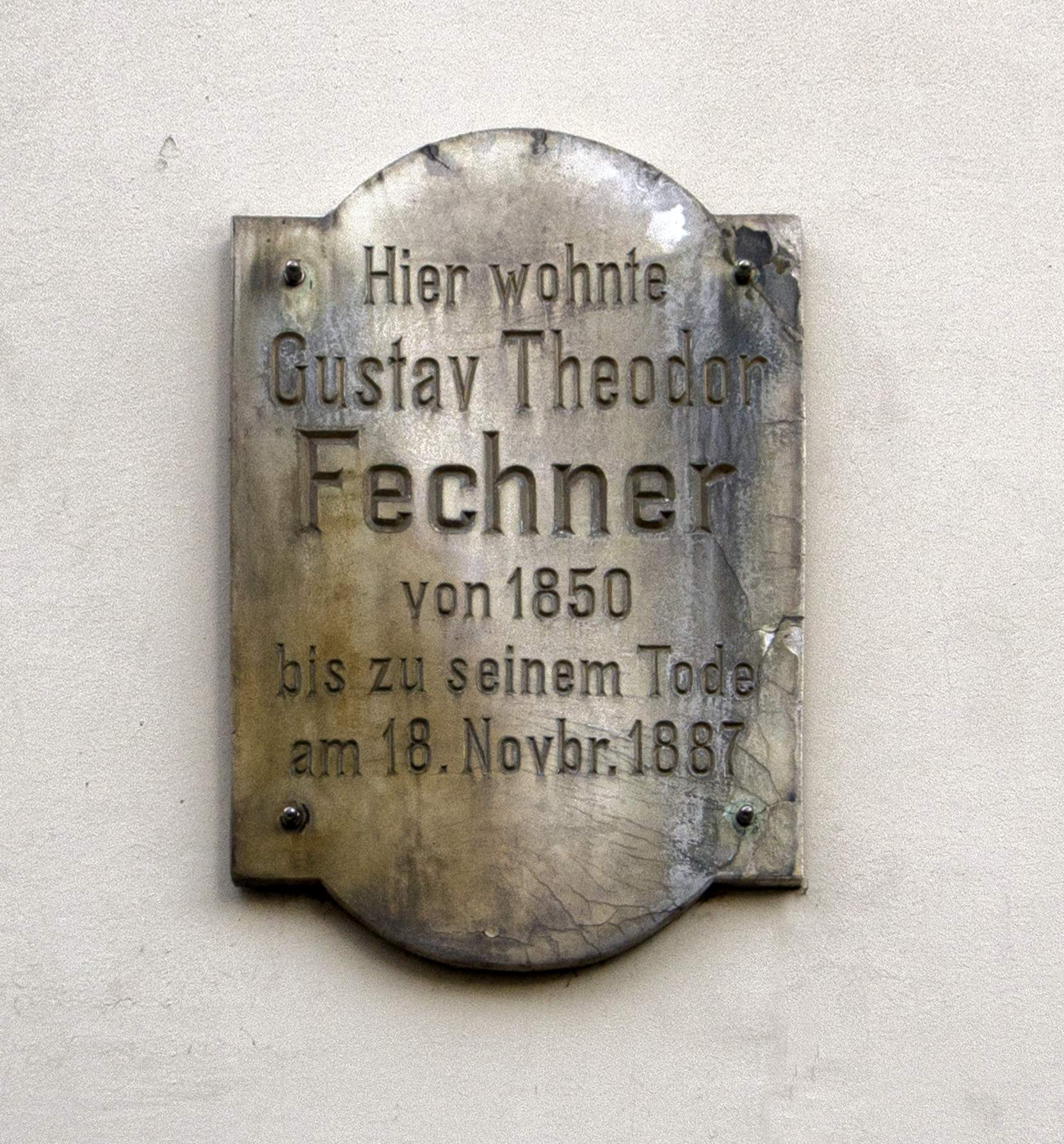 Erinnerungstafel an Gustav Theodor Fechners Wohn- und Sterbehaus in Leipzig